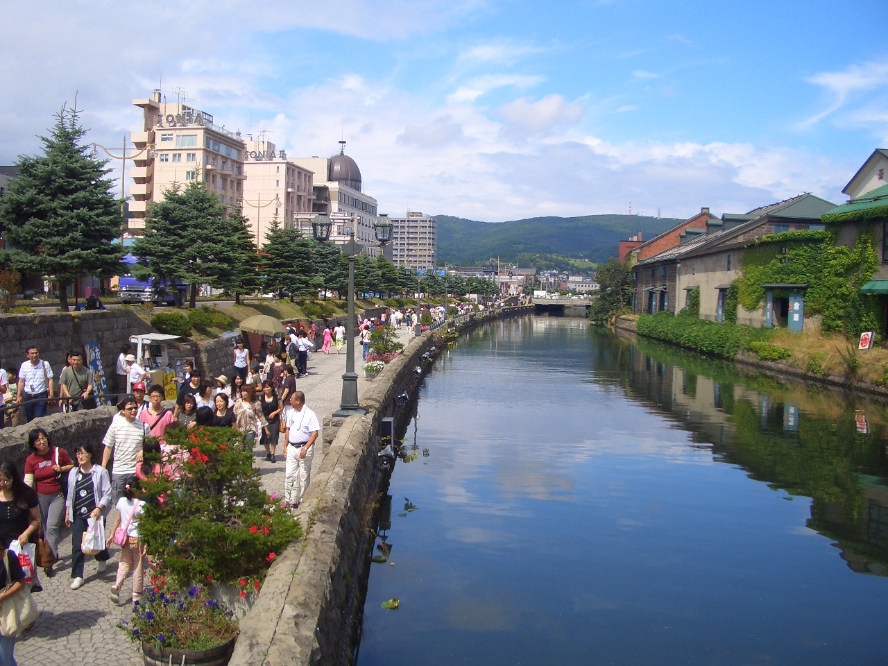 小樽運河